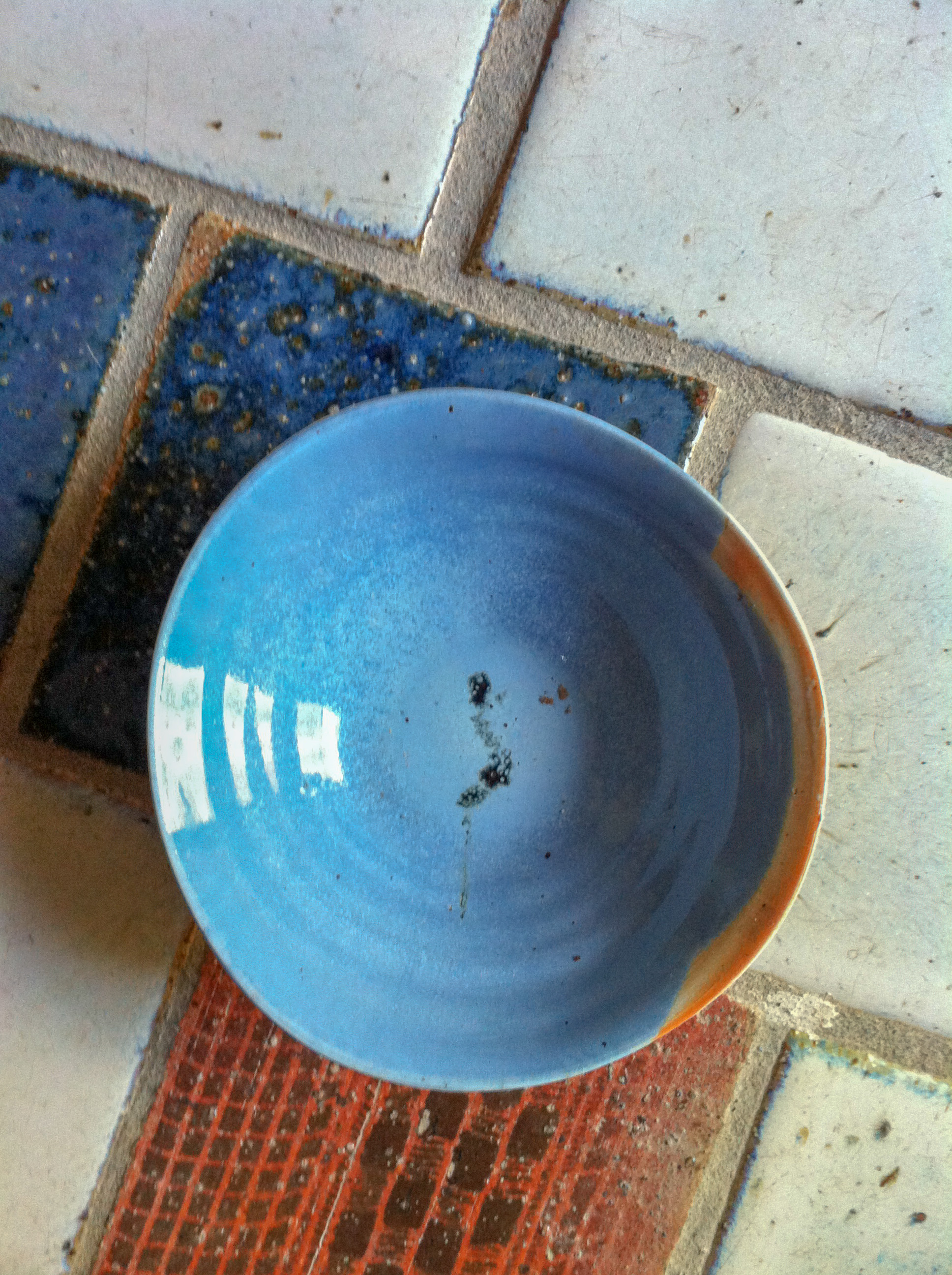 bowl.